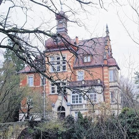 Gademann-Villa in Schweinfurt (2008)